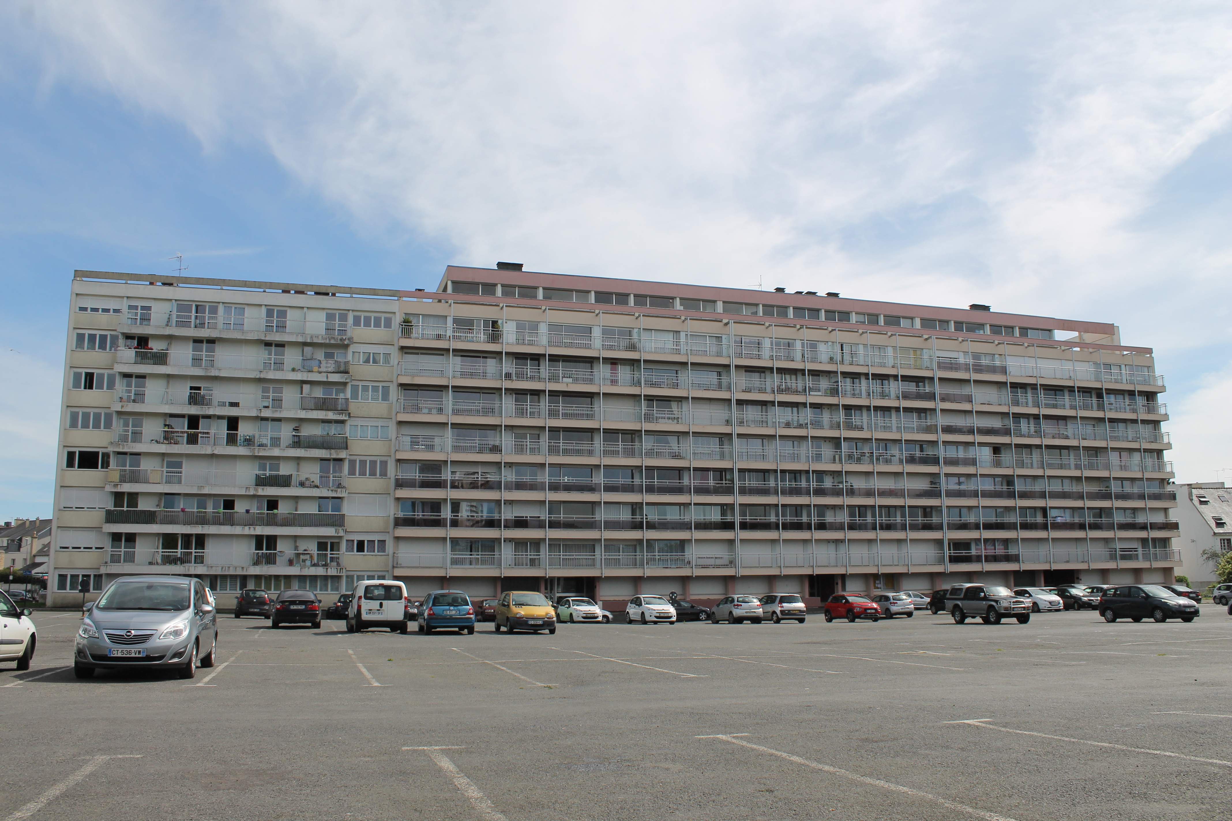 Building Place de la Liberté